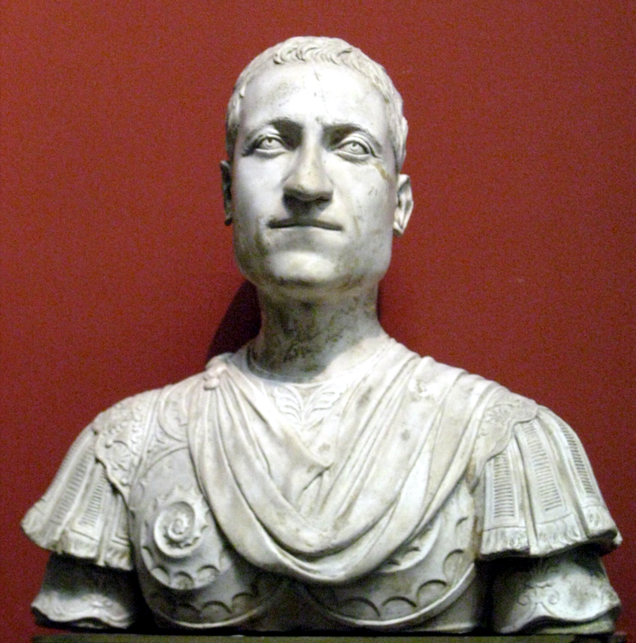 Giovanni di Cosimo de' Medici (Mino da Fiesole). Cast from original in Florence